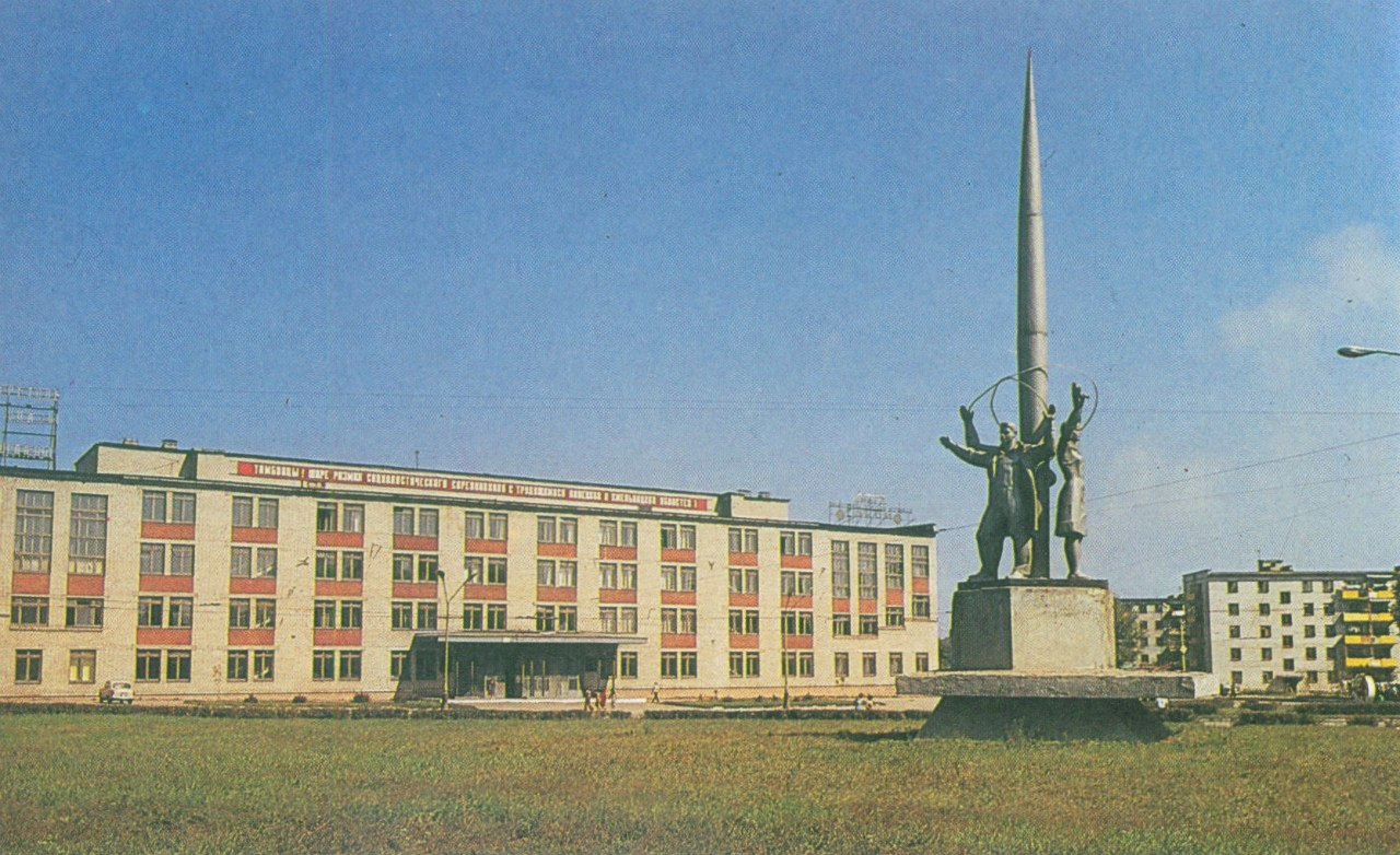 Комсомольская площадь в эпоху СССР